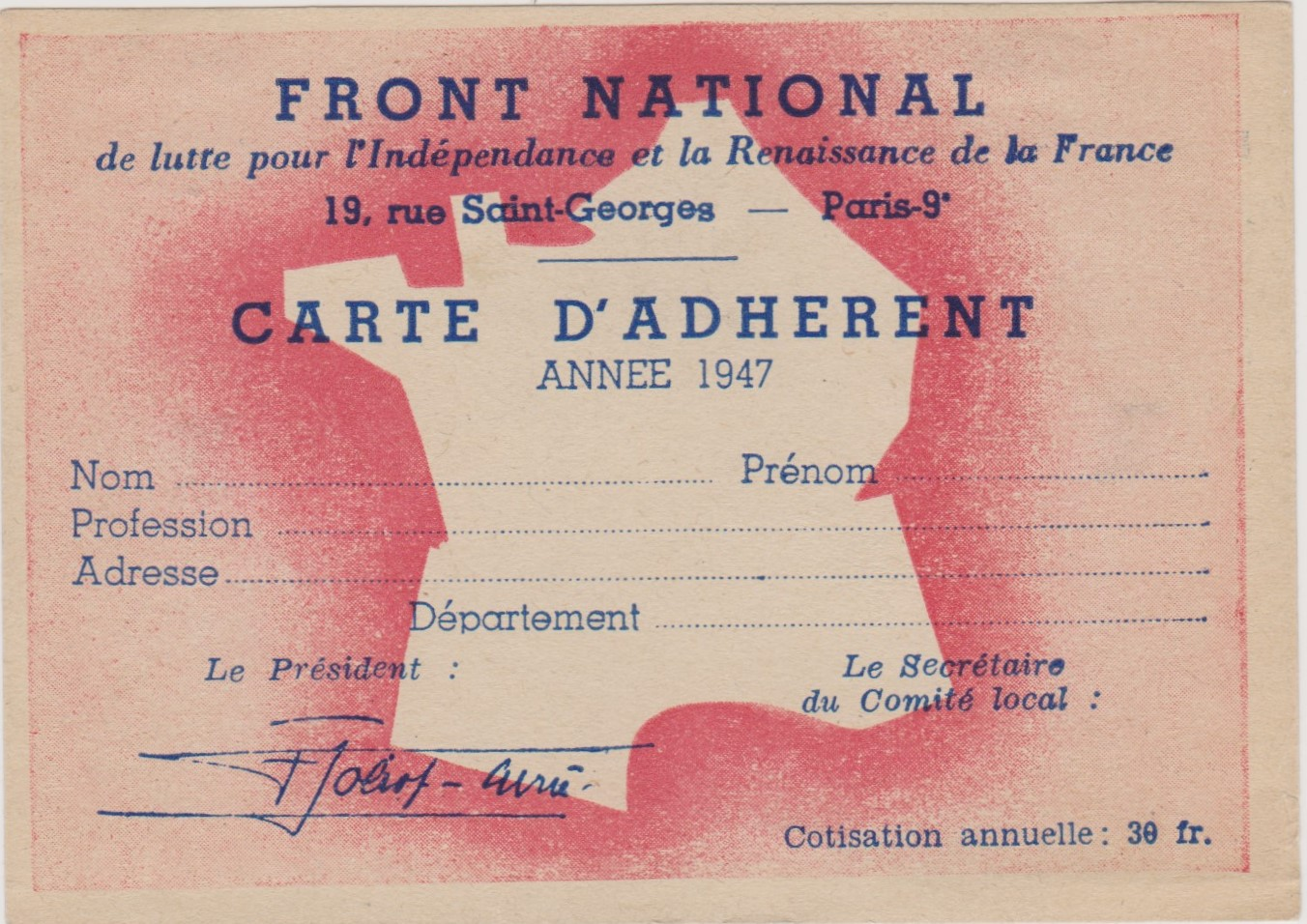 Carte d'adhésion "vierge", pour l'année 1947, signée par le président du mouvement, Frédéric Joliot-Curie. Le Front national de lutte pour la libération et l'indépendance de la France change son appellation, la libération étant acquise.